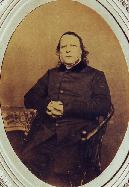 foto von Friedrich-Ludwig Mallet Familienarchiv, Foto